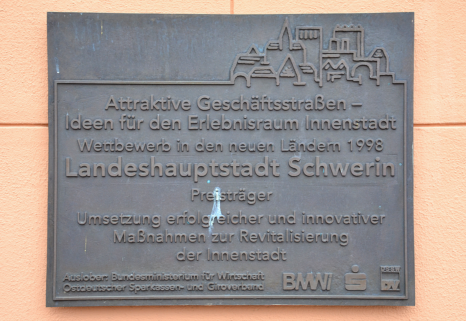 Tafel an der Fassade des Altstädtischen Rathauses in Schwerin. Unter einer skizzierten (Altstadt)-Silhouette findet sich der Text „Attraktive Geschäftsstrassen - Ideen für den Erlebnisraum Innenstadt Wettbewerb in den Neuen Ländern 1998 Preisträger Umsetzung erfolgreicher und innovativer Maßnahmen zur Revitalisierung der Innenstadt Auslober: Bundesministerium für Wirtschaft Ostdeutscher Sparkassen- und Giroverband“ rechts daneben gefolgt von den Logos BMWI, dem Sparkassen-Zeichen und dem kombinierten Zeichen des Deutschen Seminars für Städtebau und Wirtschaft (DSSW) mit dem Deutschen Verband für Wohnungswesen, Städtebau und Raumordnung (DV). Aufgenommen am nebeligen Vormittag des 2. November 2015 nach dem von verschiedenen Wikipedianern veranstalteten Arbeitstreffen Wikipedia:WikiDACH 2015 im Schweriner Schloss ...